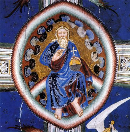 Gottvater in der Mandorla, Fresko (Anfang 15. Jh.), Kirche St. Martin in Kampill, Bozen, Südtirol